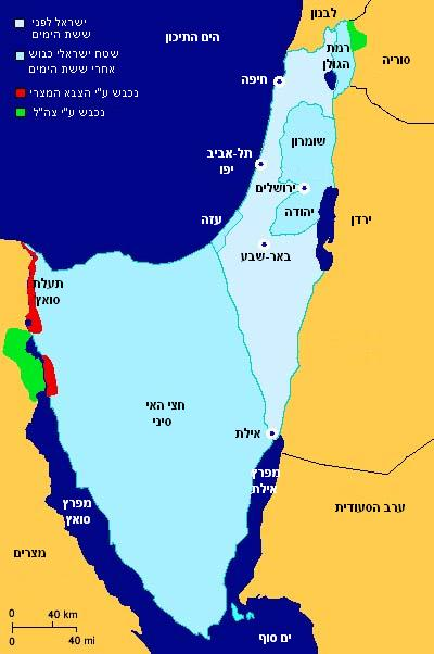 מפה של ישראל אחרי מלחמת יום כיפור